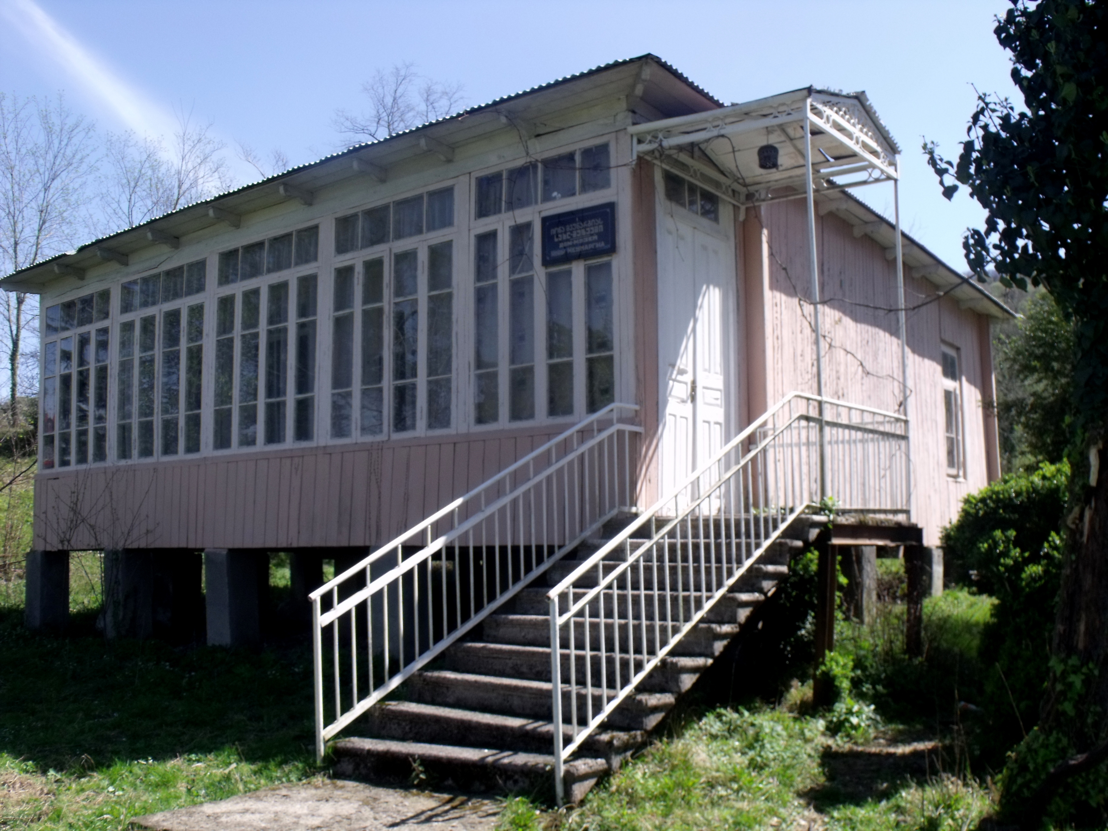 იონა მეუნარგიას სახლ-მუზეუმი. სახლ-მუზეუმი სოფელ ცაიშშია, ცაიშის საკათედრო ტაძართან. ბოლოს გასულ გაზაფხულს ვიყავი და ფუნქციონირებდა ჩვეულებრივ.